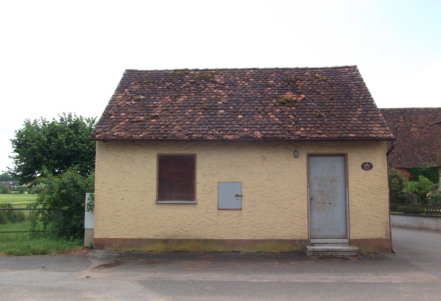 altes Milchhaus in Retzelfembach